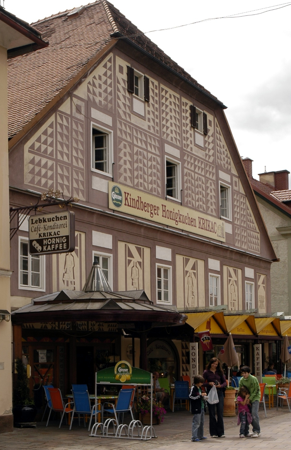 Haus aus Kindberg (Hauptstrass 65) mit der Inschrift: In diesem Haus ist im Jahre 1886 der Komponist Jakob Eduard Schmölzer gestorben